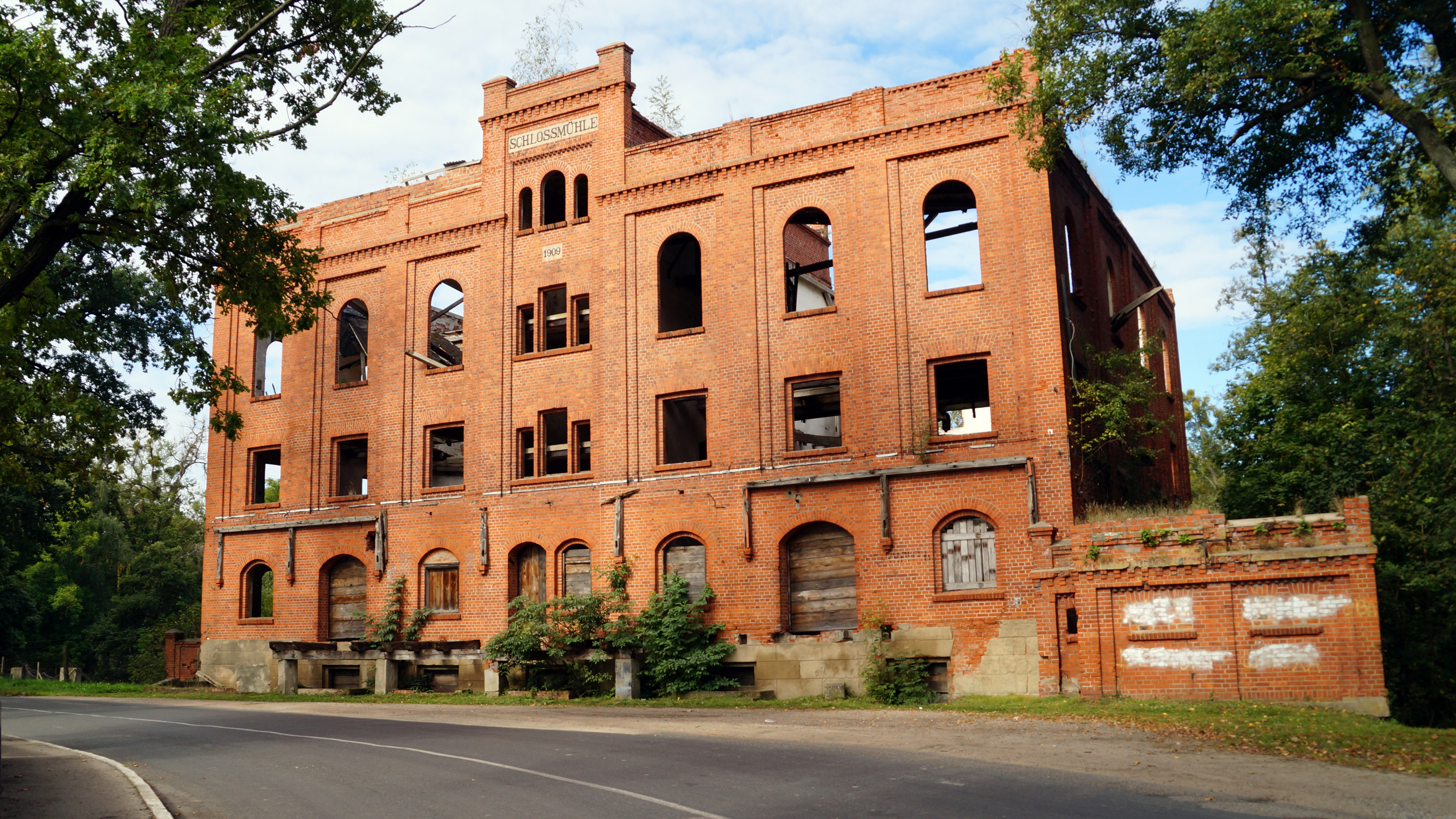 Замковая мельница: улица Черняховского, 31а, Железнодорожный, Правдинский район, Калининградская область